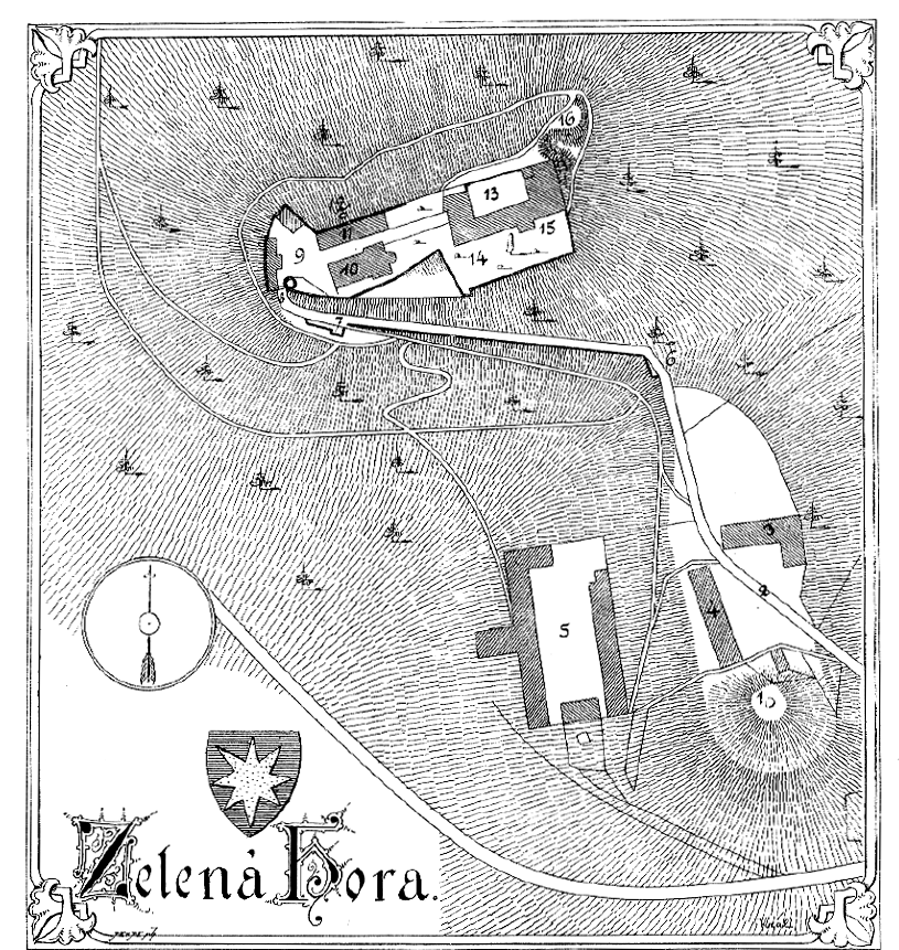 Zelená hora – půdorys hradu od Vojtěcha Krále z Dobré Vody publikovaný roku 1893; Popis: 1 – bašta, 2 – cesta od Nepomuku, 3 – sladovna, 4 – sýpka, 5 – pivovar, 6–8 – brány, 9 – předhradí, 10 – kostel, 11 – konírna a sýpky, 12 – cisterna, 13 – nádvoří, 14 – parkán, 15 – veranda, 16 – bašta